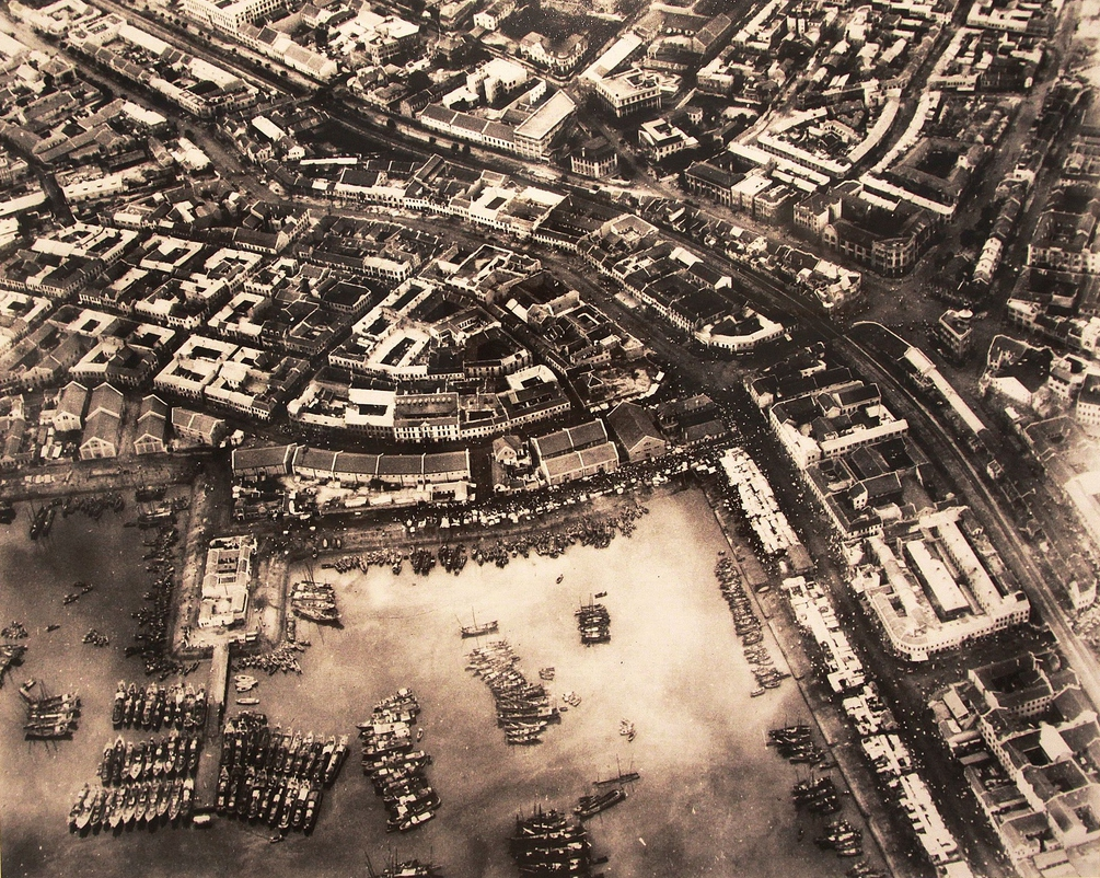 青岛小港及海关后一带航拍